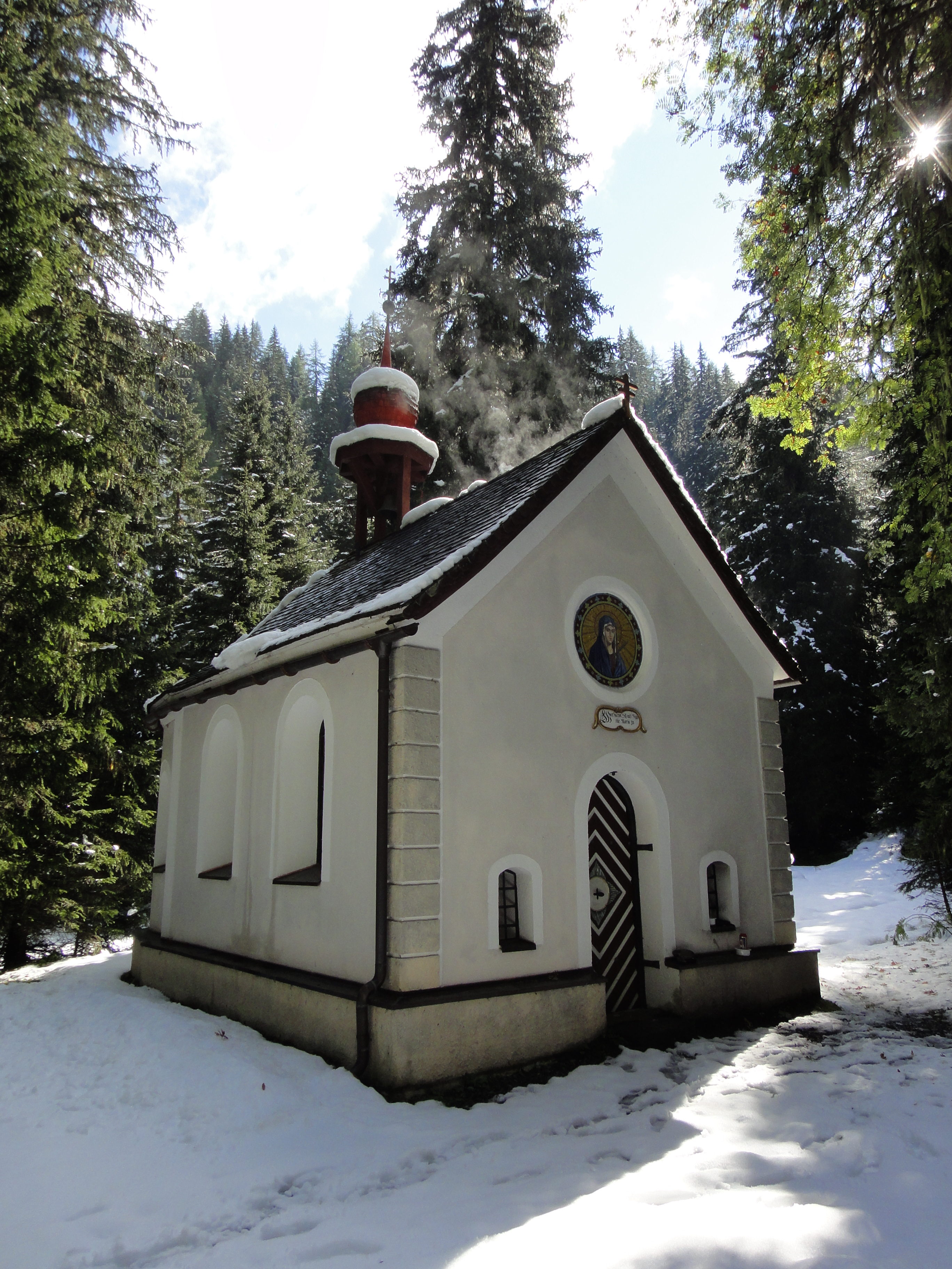 Unterpardatsch, Kapelle Zu den 7 Schmerzen Mariens, Ischgl, Tirol